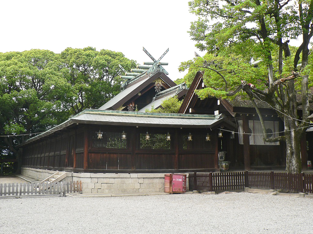 Ootori-taisha main shrine, Sakai, Osaka, Japan（大阪府堺市の大鳥大社本殿）